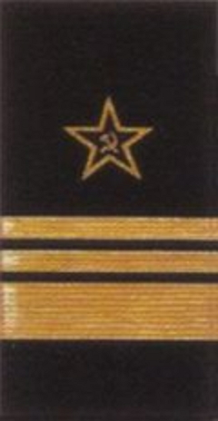 Знаки различия высшего ком. сост. флота до 1943 г., здесь нарукавные знаки различия «Вице-aдмирала» (ОФ7).